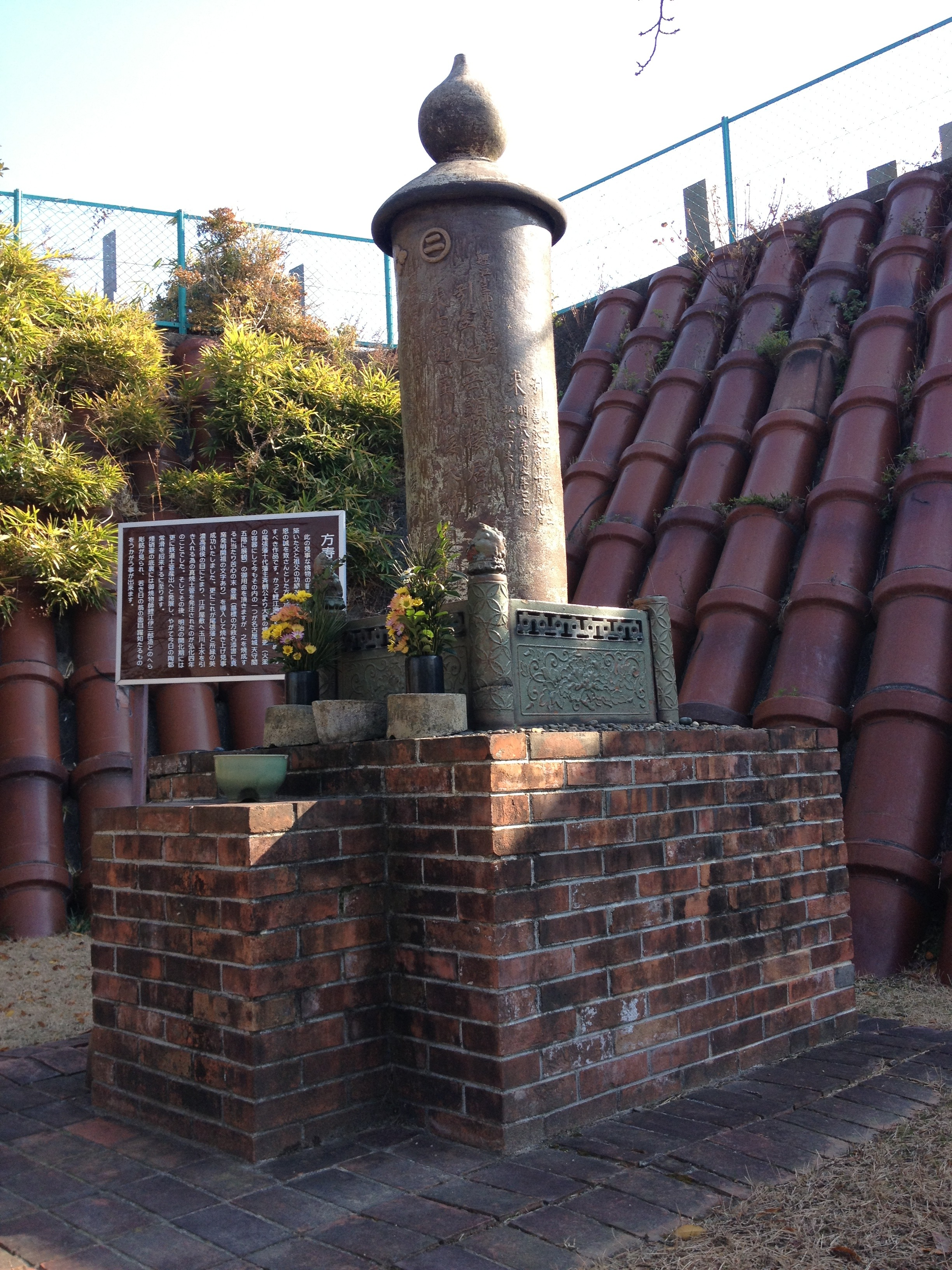 鯉江方寿の墓